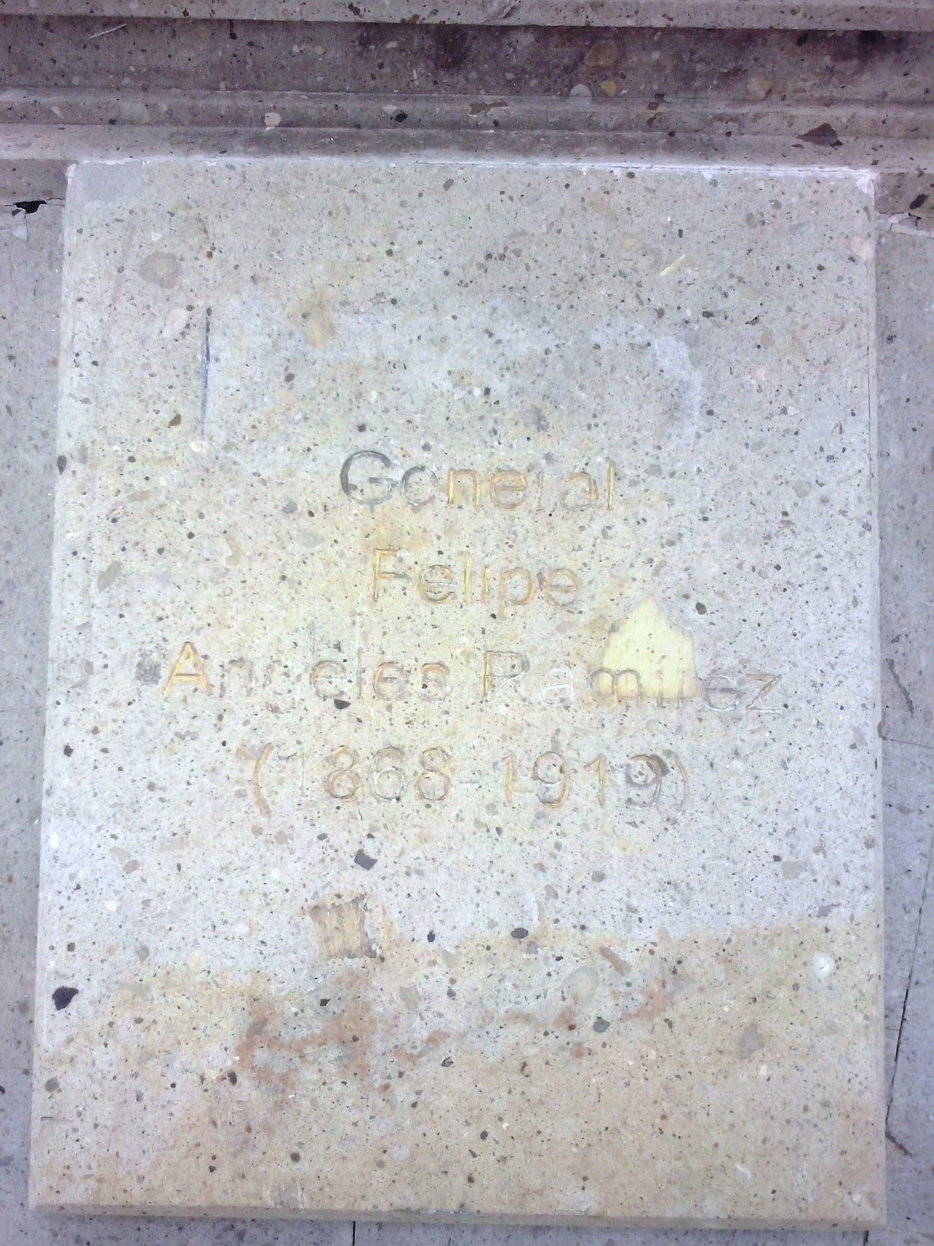 Rotonda de los Hidalguenses Ilustres en Pachuca, México